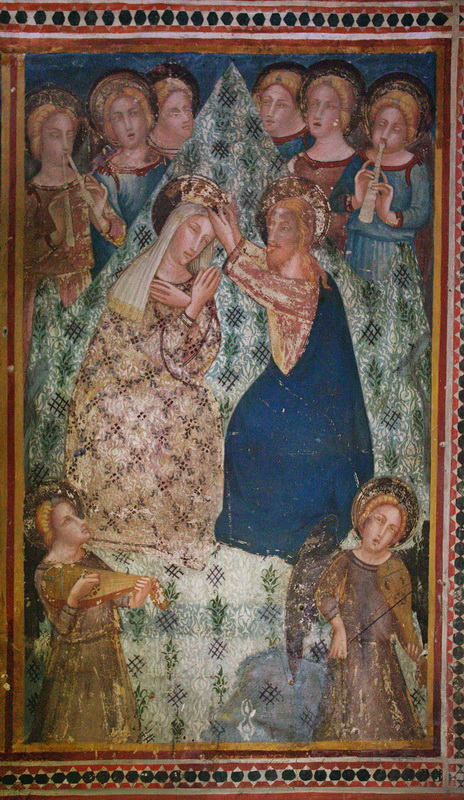 Coronació de la Mare de Déu